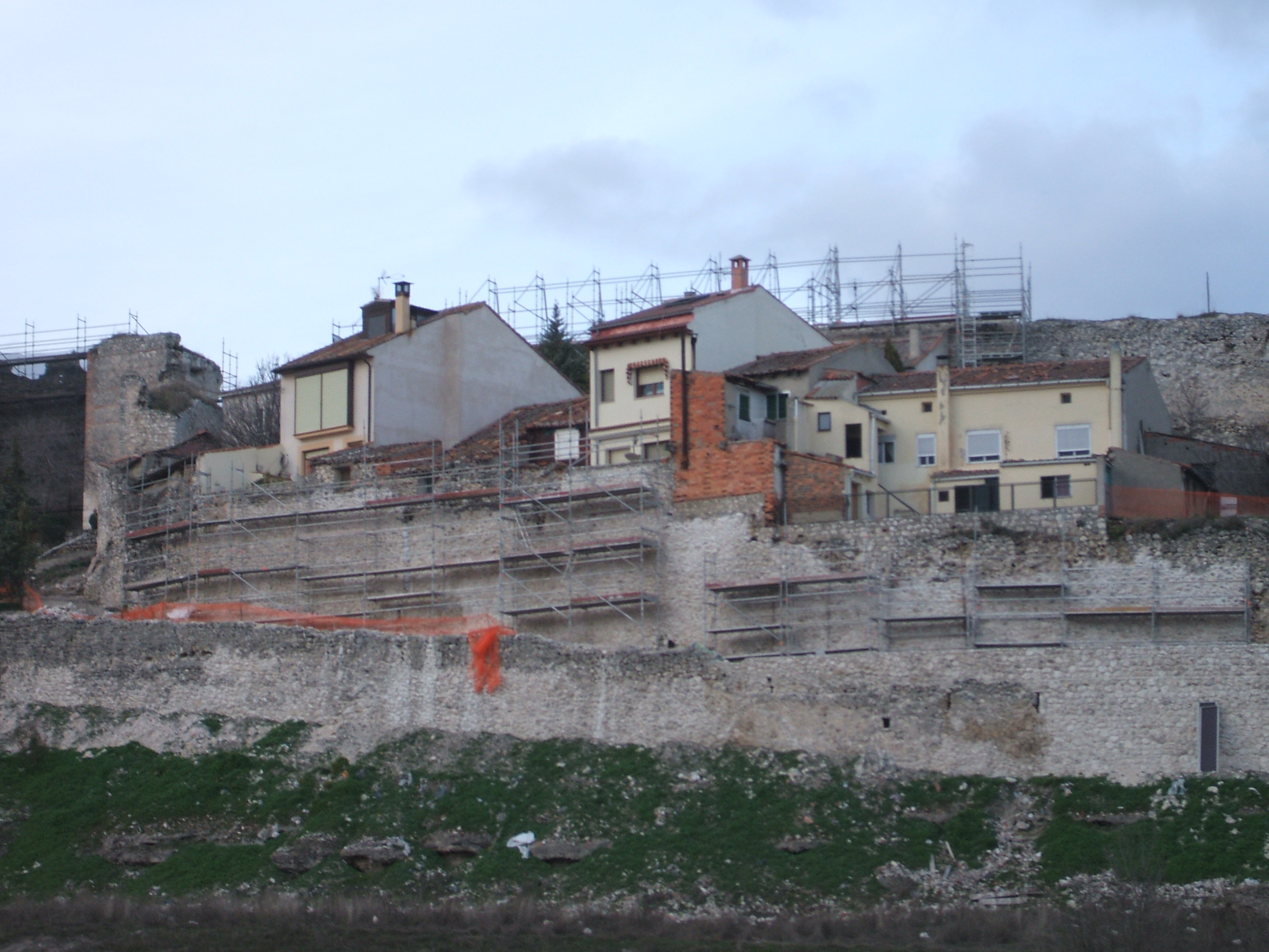 Restauración del paño de muralla cercano al desaparecido arco de los Cueva (Cuéllar).